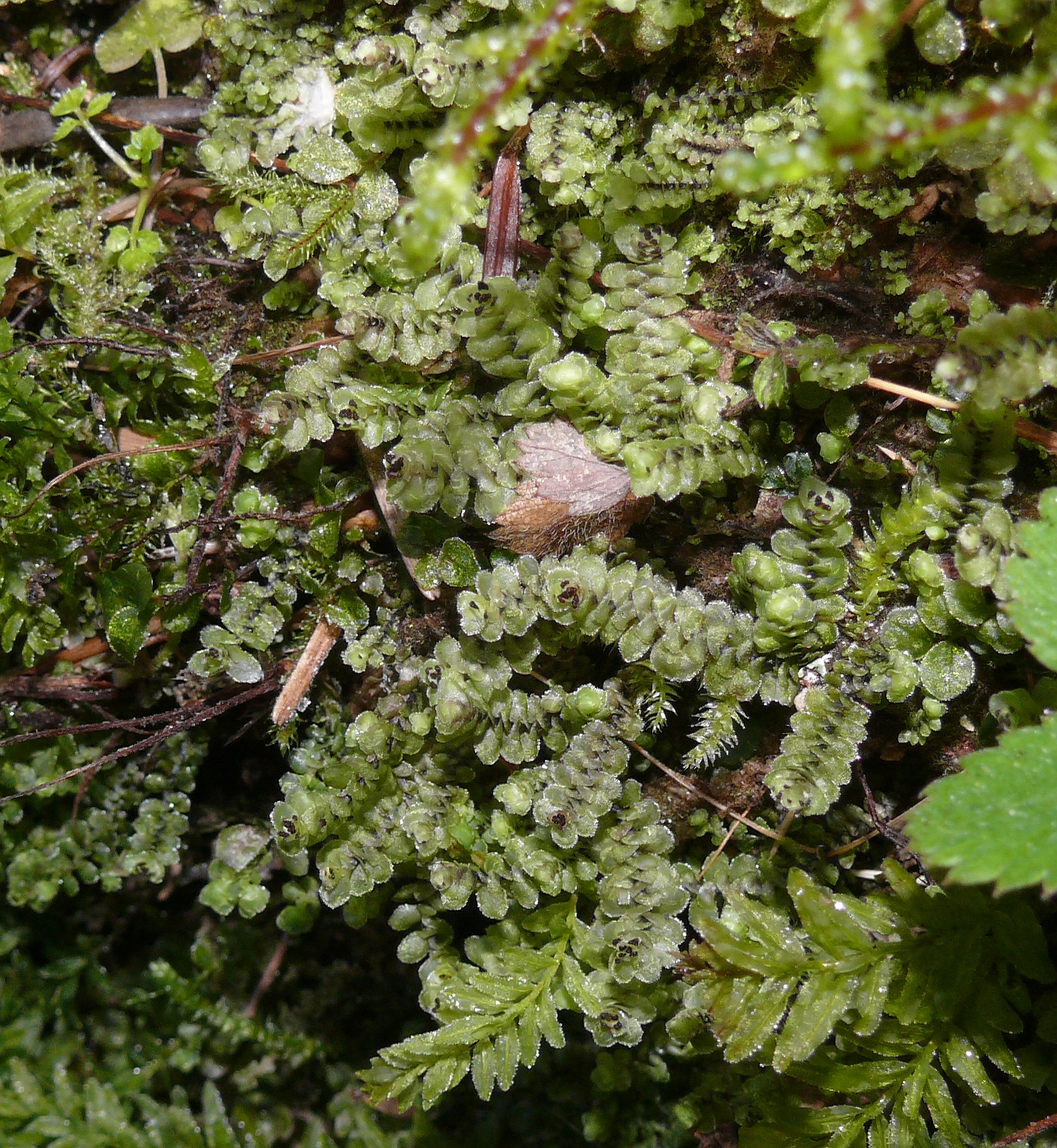 Scapania nemorea slightly frozen, Schwäbisch-Fränkische Waldberge, Germany